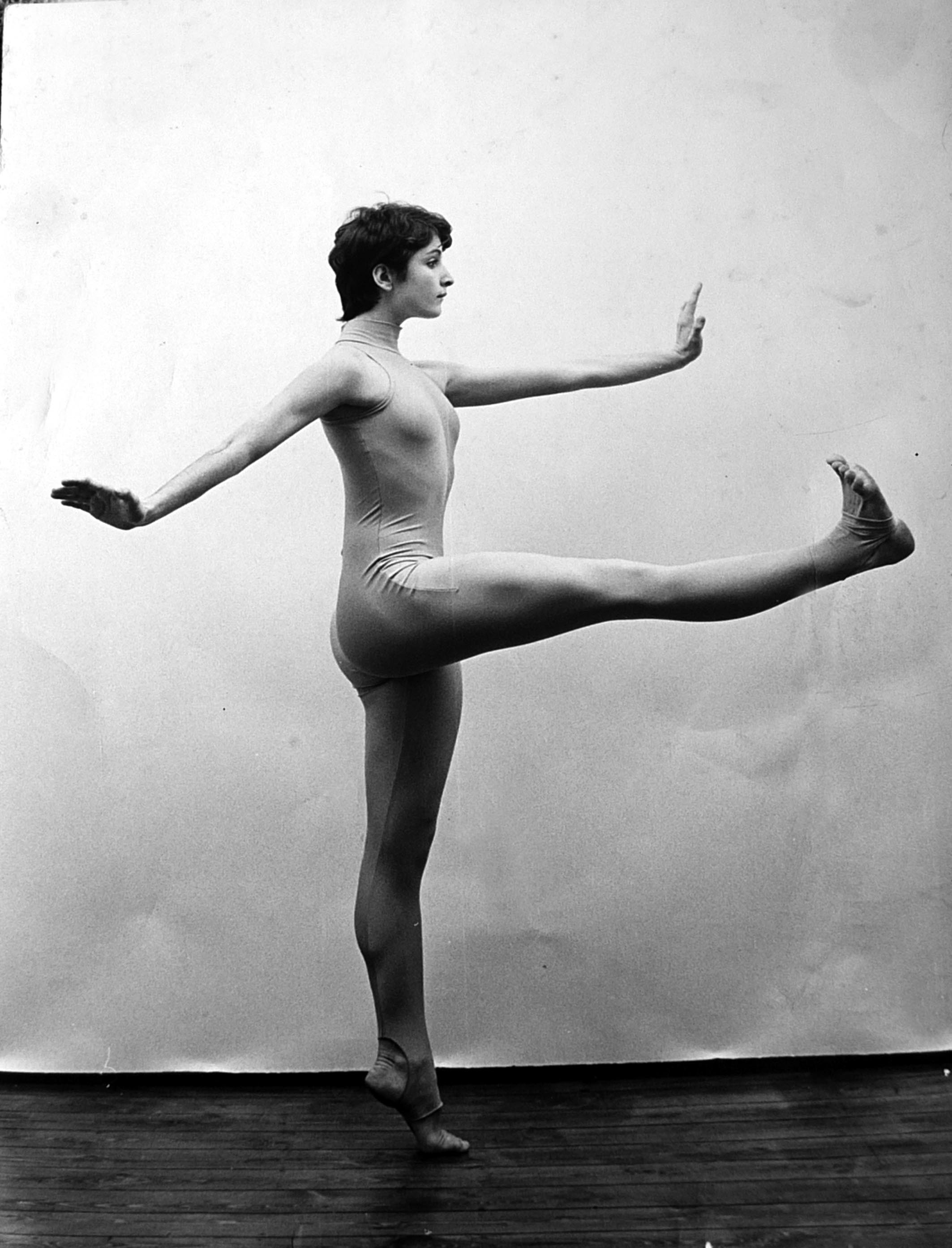 Ensayo 1977